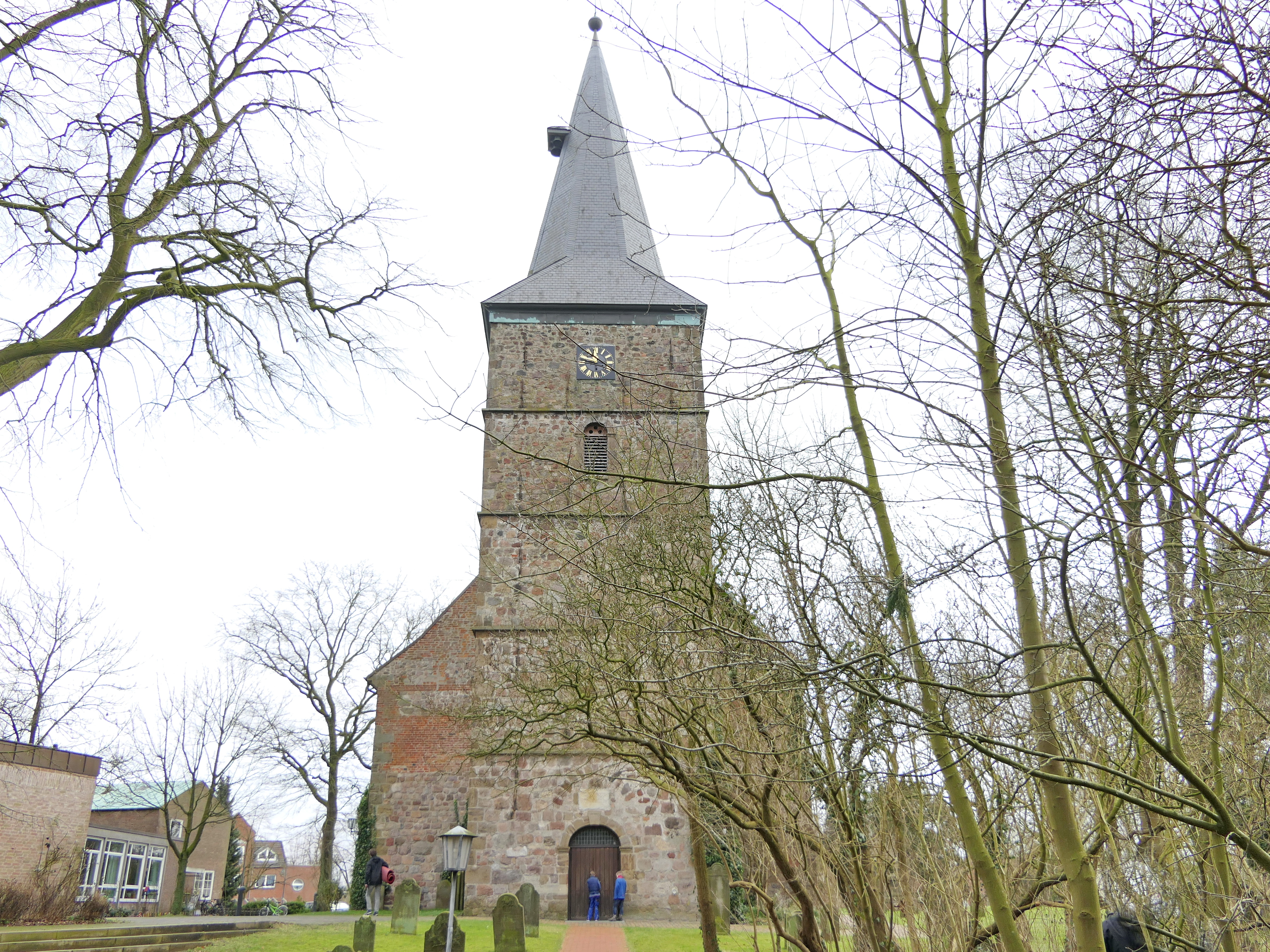 St.-Martini-Kirche (Bremen-Lesum), Westteingang